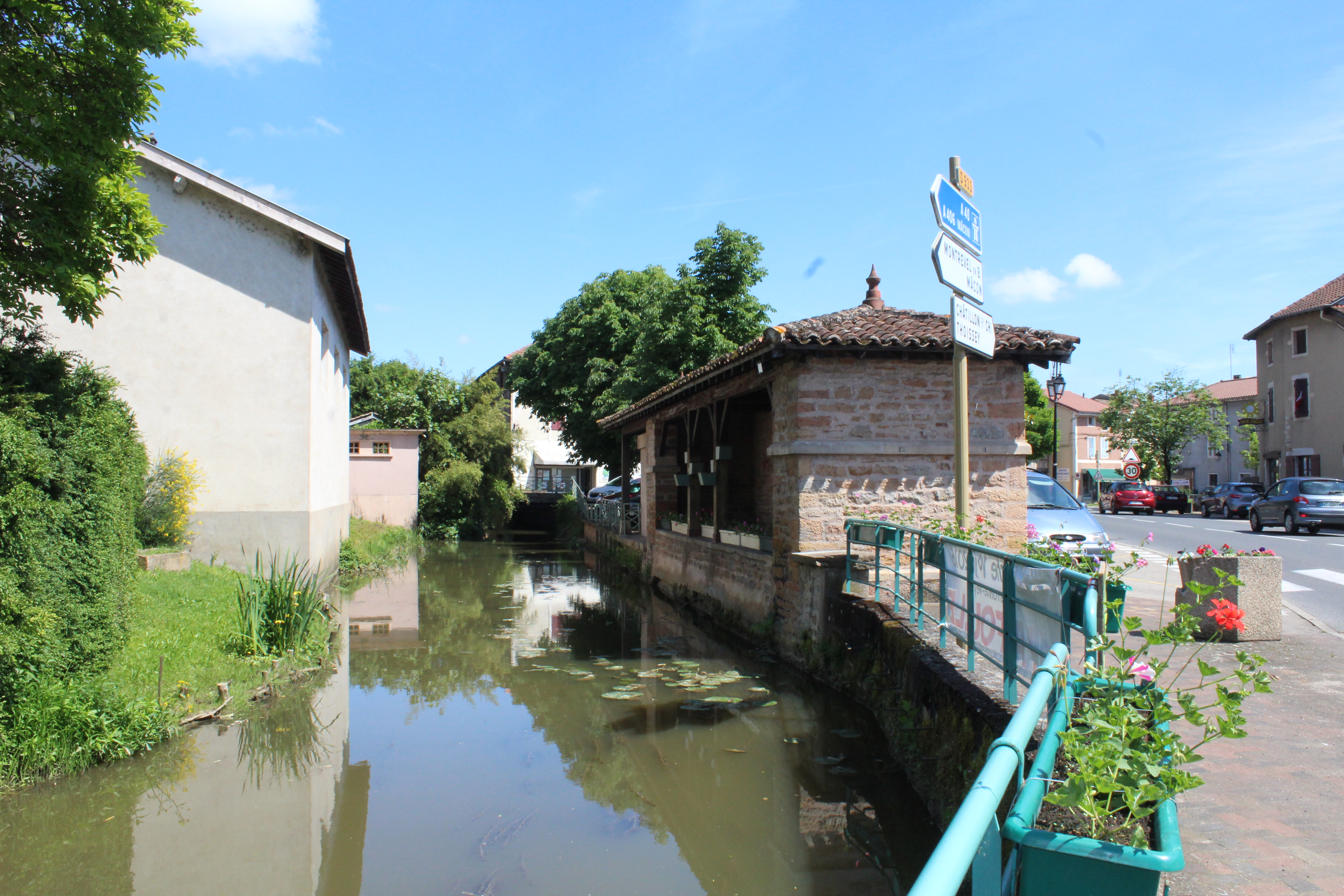 Lavoir à Pont-de-Veyle sur la place Bellecour.